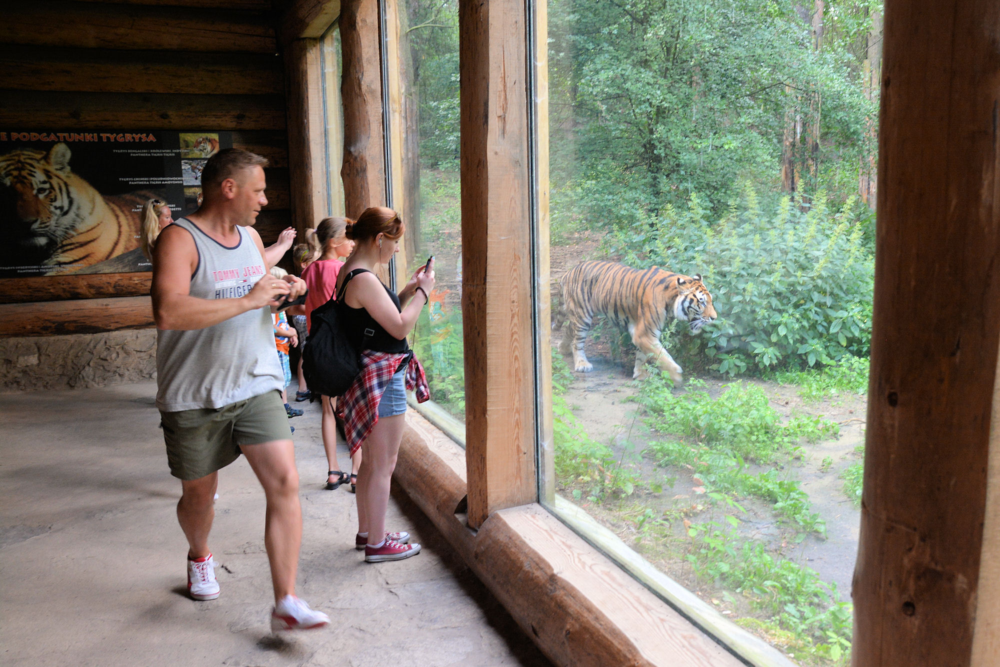 Wybieg tygrysów w poznańskim Nowym Zoo